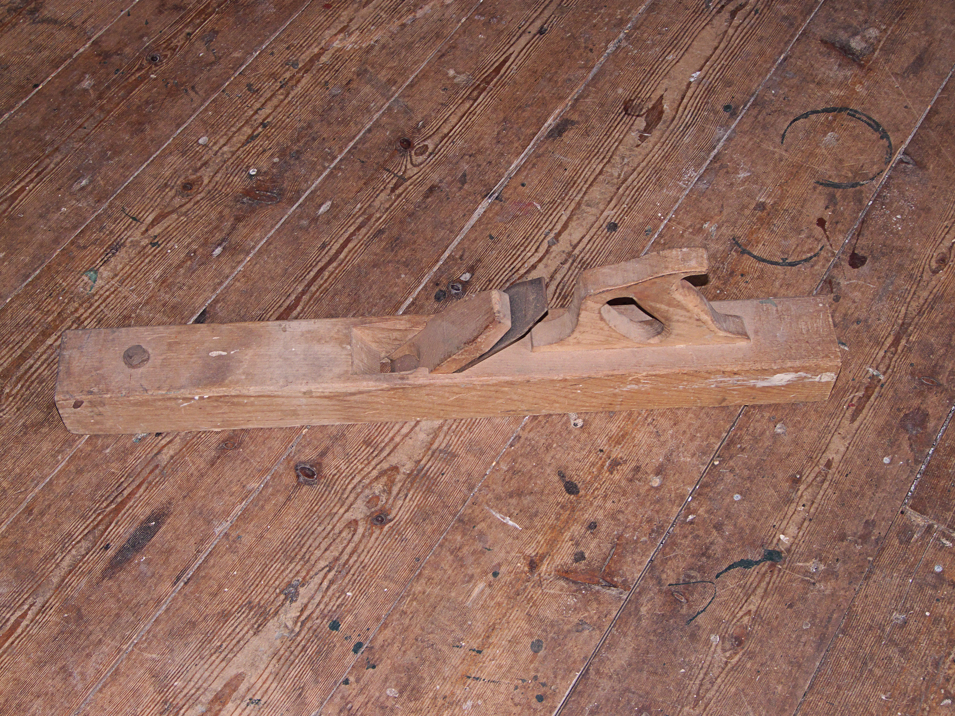 reischaaf